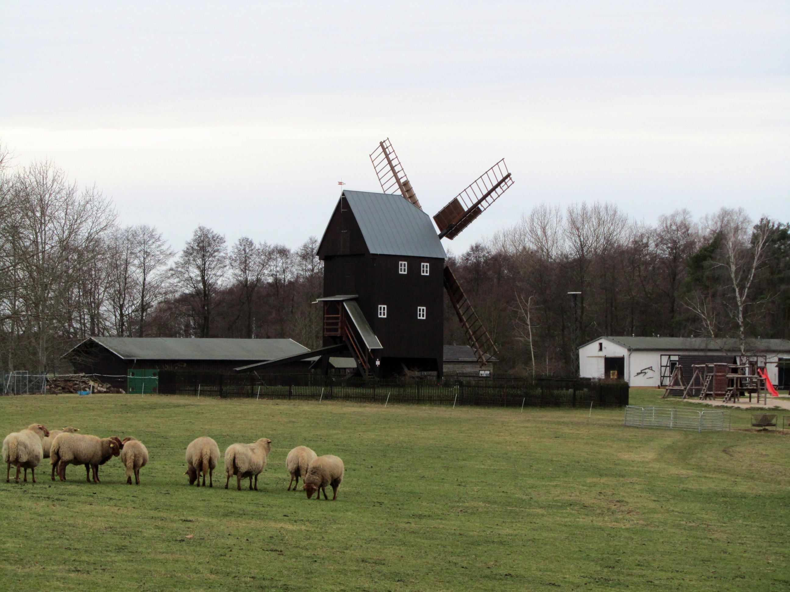 Reibitz,Werbeliner Bockwindmühle, 1844 in Werbelin erbaut. 1991 muste der Ort und die Mühle dem Braunkohleabbau weichen und wurde demontiert. 1994 wurde die Mühle im Schullandheim Reibitz wieder errichtet.